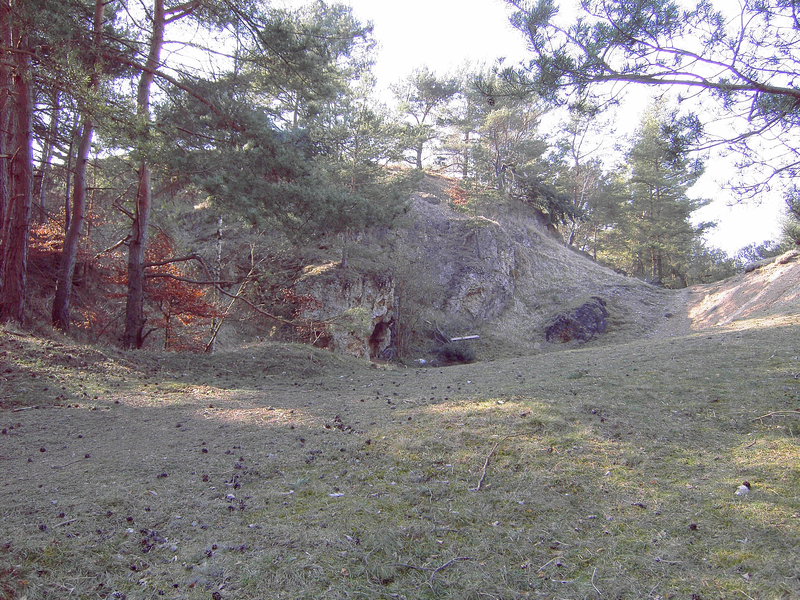 Das Bild zeigt den verschütteten Hillemann-1-Stollen am Schlangenberg